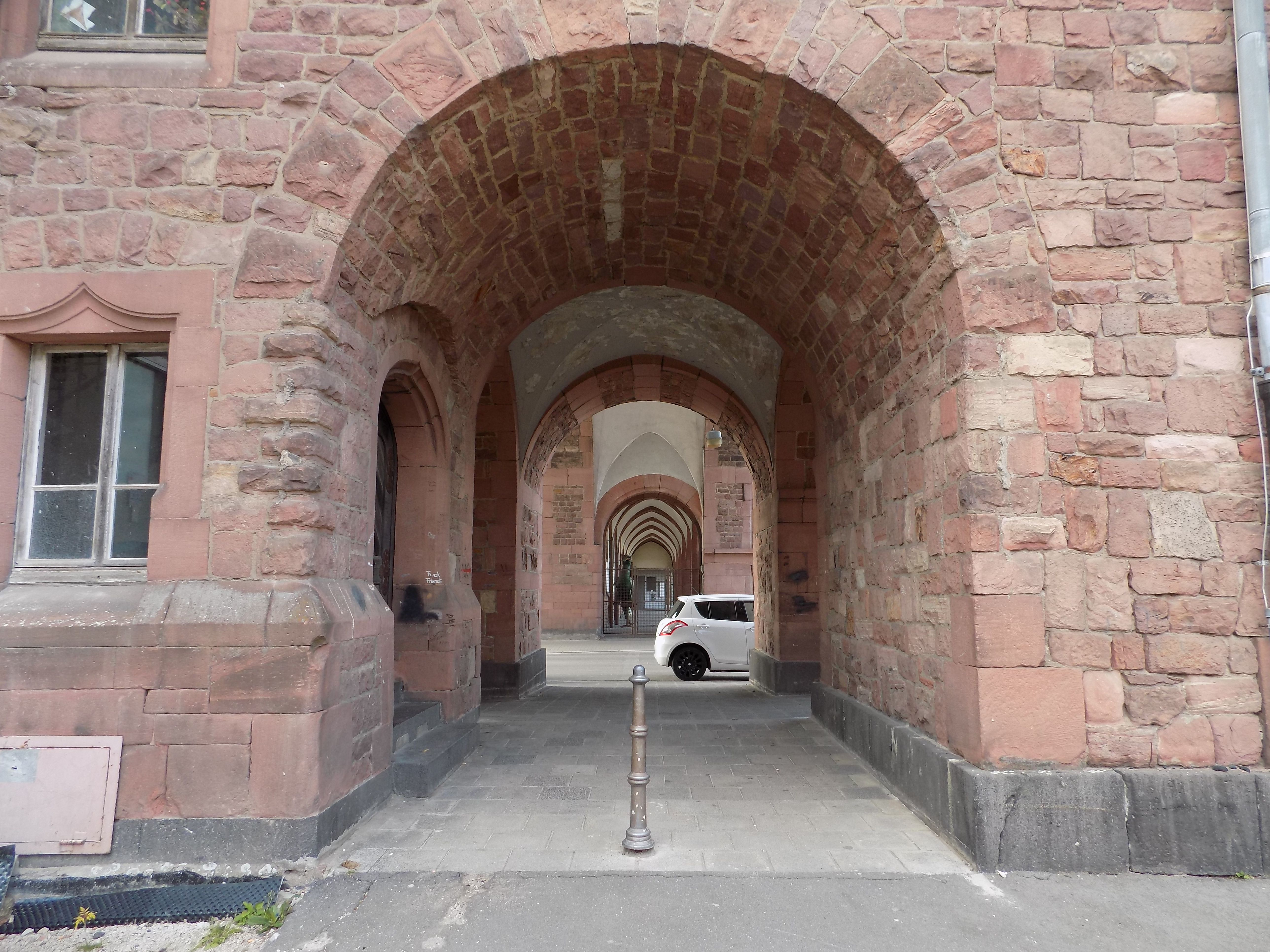 Nibelungenschule Worms Arkaden